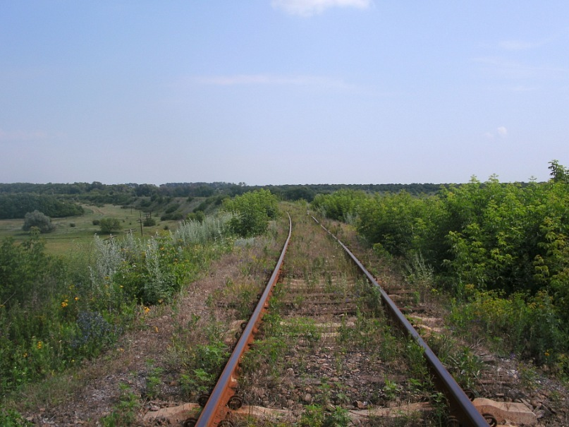 Залізниця Мерцалове - Дубове в районі села Нововодяне